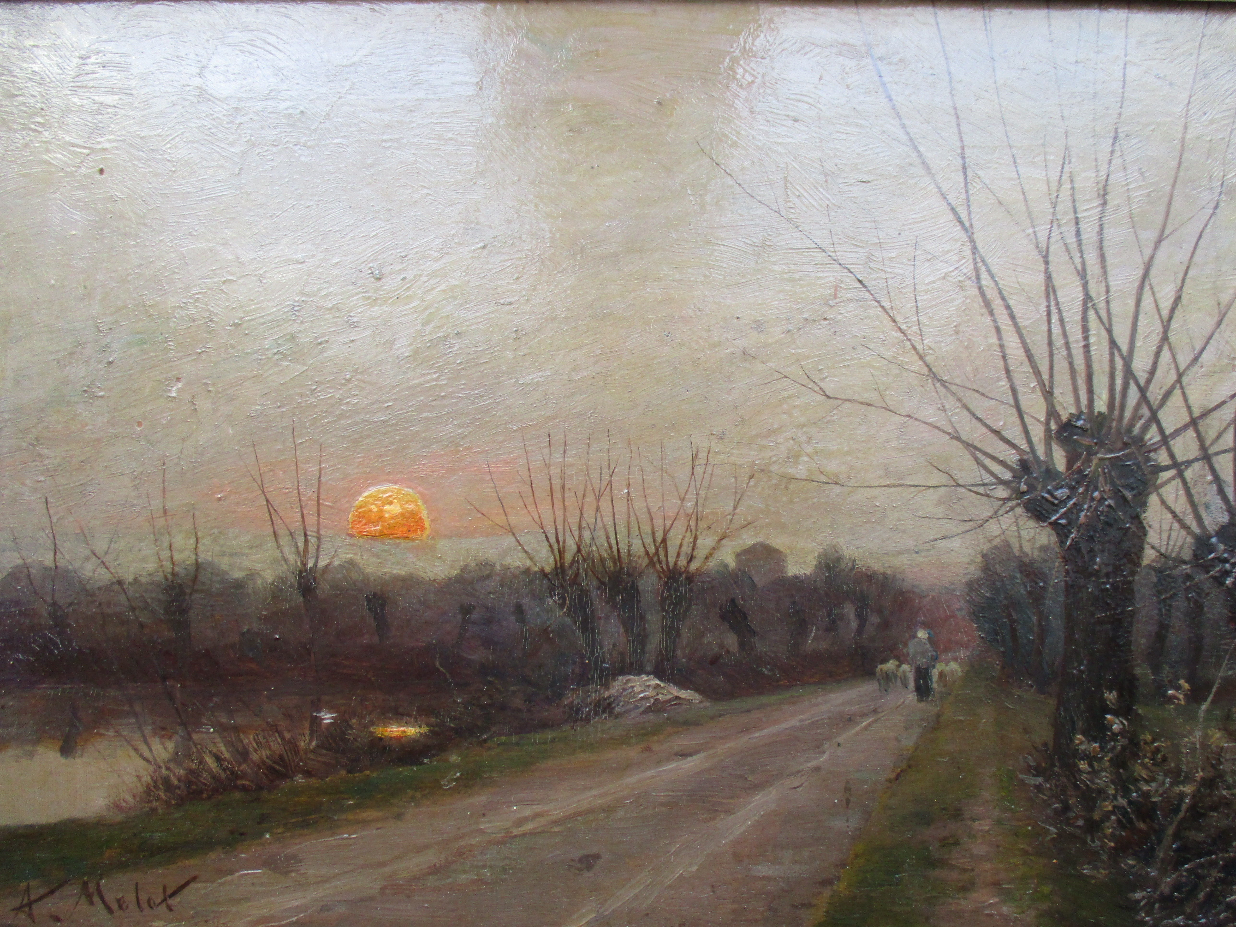 Paysage d'Alfred Melot